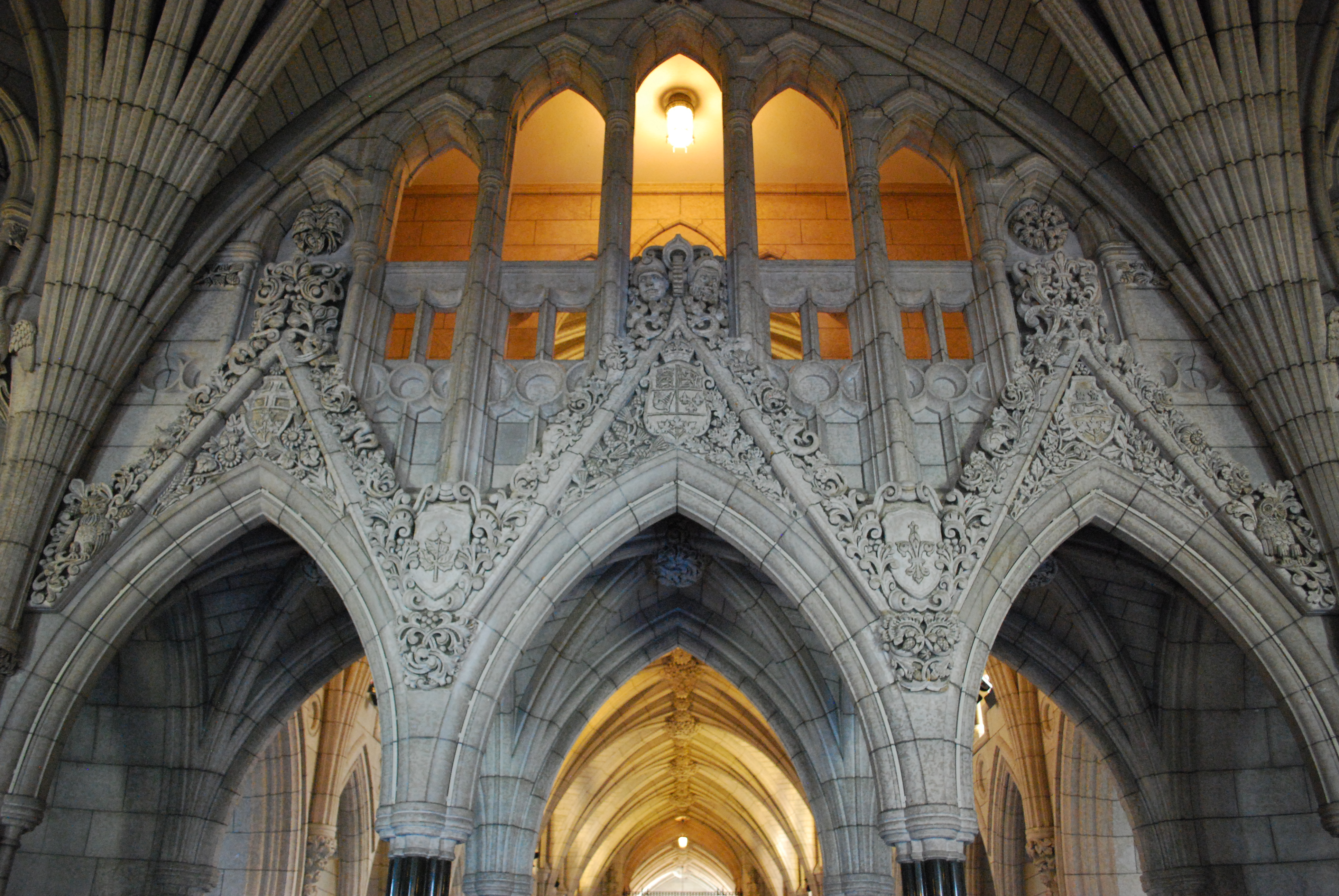 Salle centrale de l'édifice du Centre sur la Colline du Parlement à Ottawa